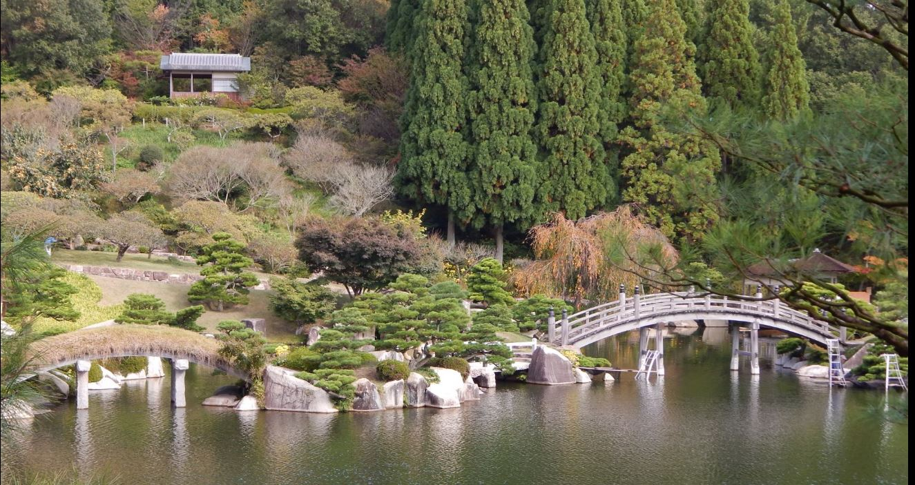 De reis van Marco gaat verder. Vandaag bezoeken we eerst een Japanse Garden en daarna opnieuw Tamaura en als laatst Sakai Fish Farm. Veel nieuwe indrukken, die ik graag wil delen met de lezers. KoihuntJapan, #Sakai, #Tamaura